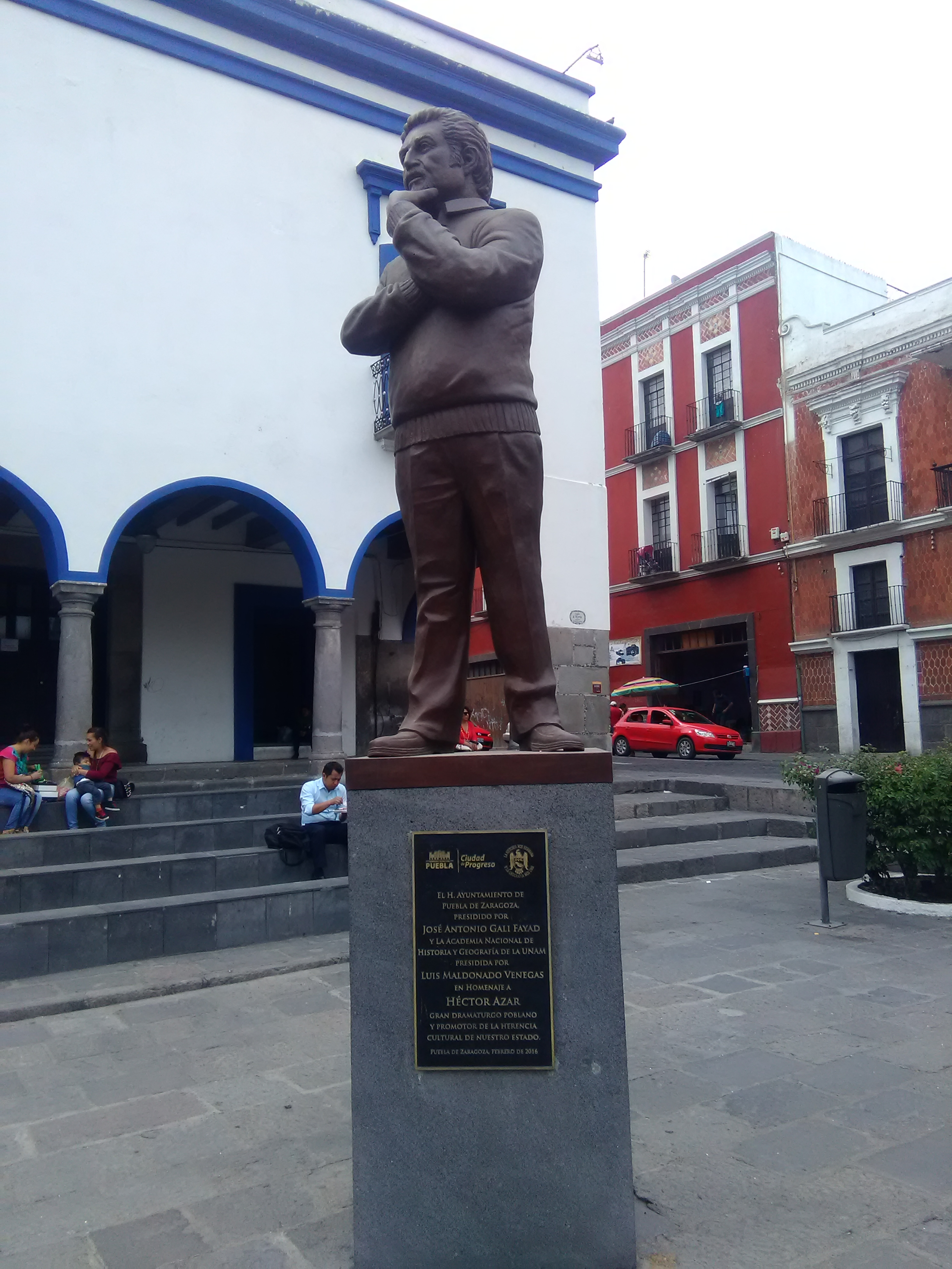 Monumento al dramaturgo poblano Héctor Azar en la explanada del Teatro Principal en la Ciudad de Puebla